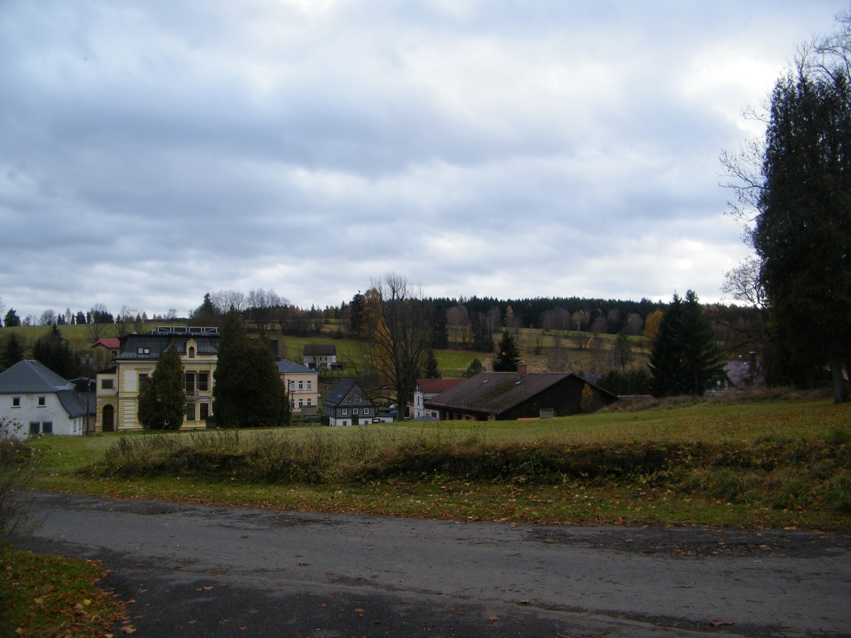 Místo, kde stával kostel svatého Martina v Brtníkách